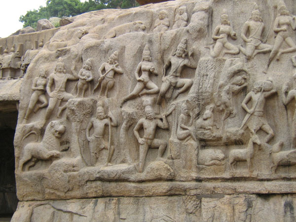 Shot by User Mayooranathan